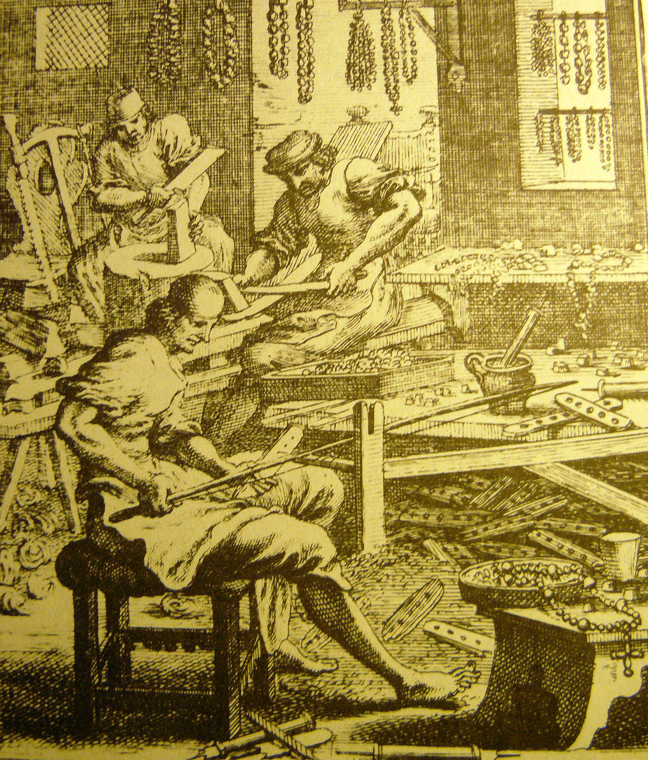 C. Weigel: "Künstler und Handwercker", Regensburg 1698